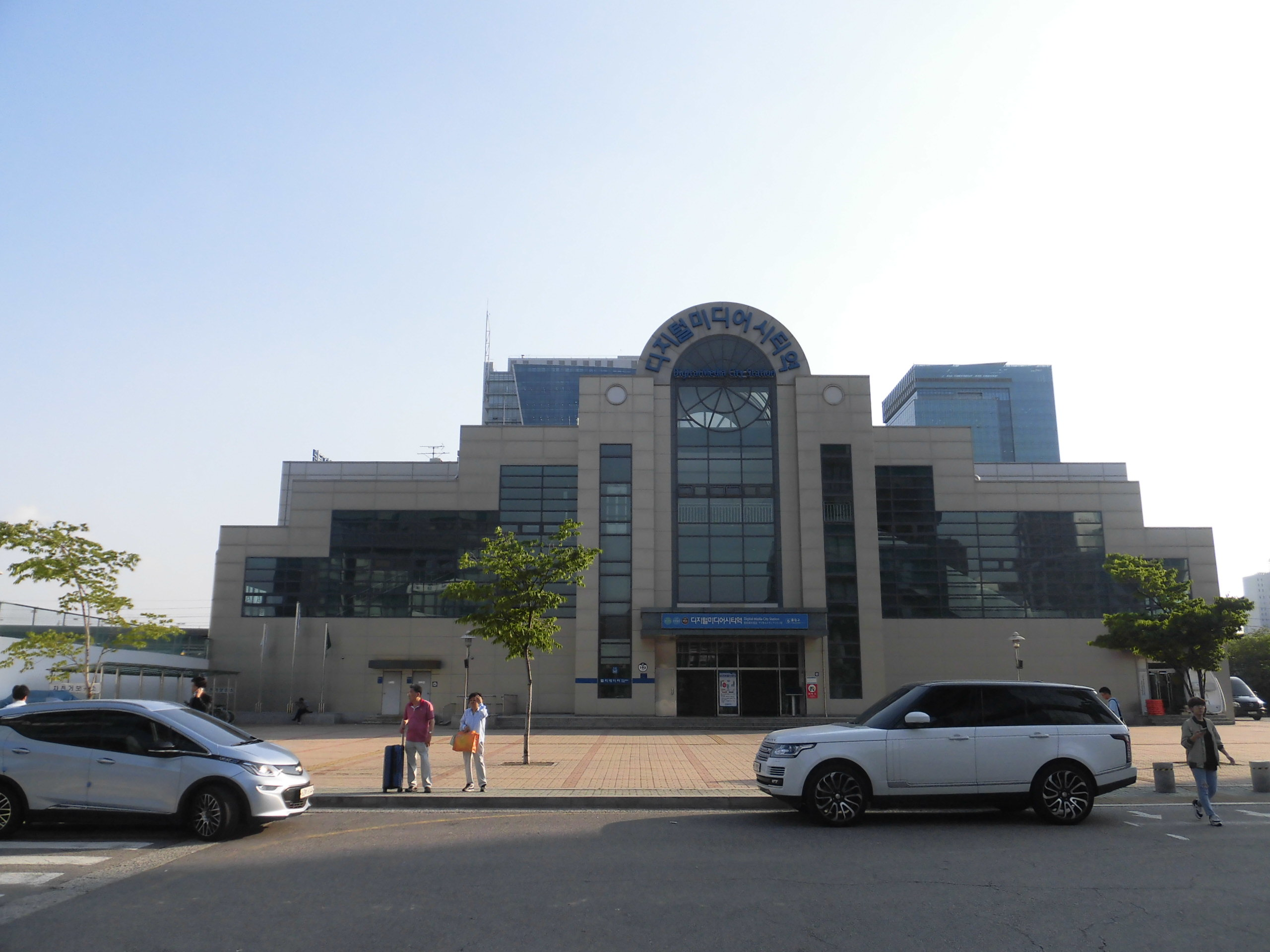 경의선 DMC역